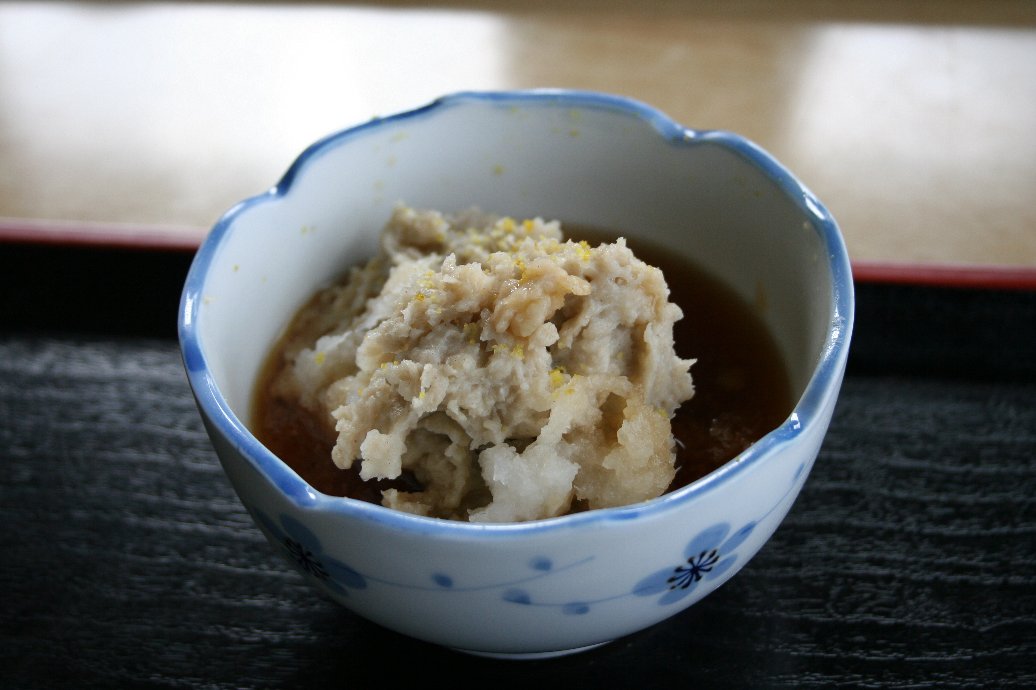 蕎麦がき (栃木県日光)